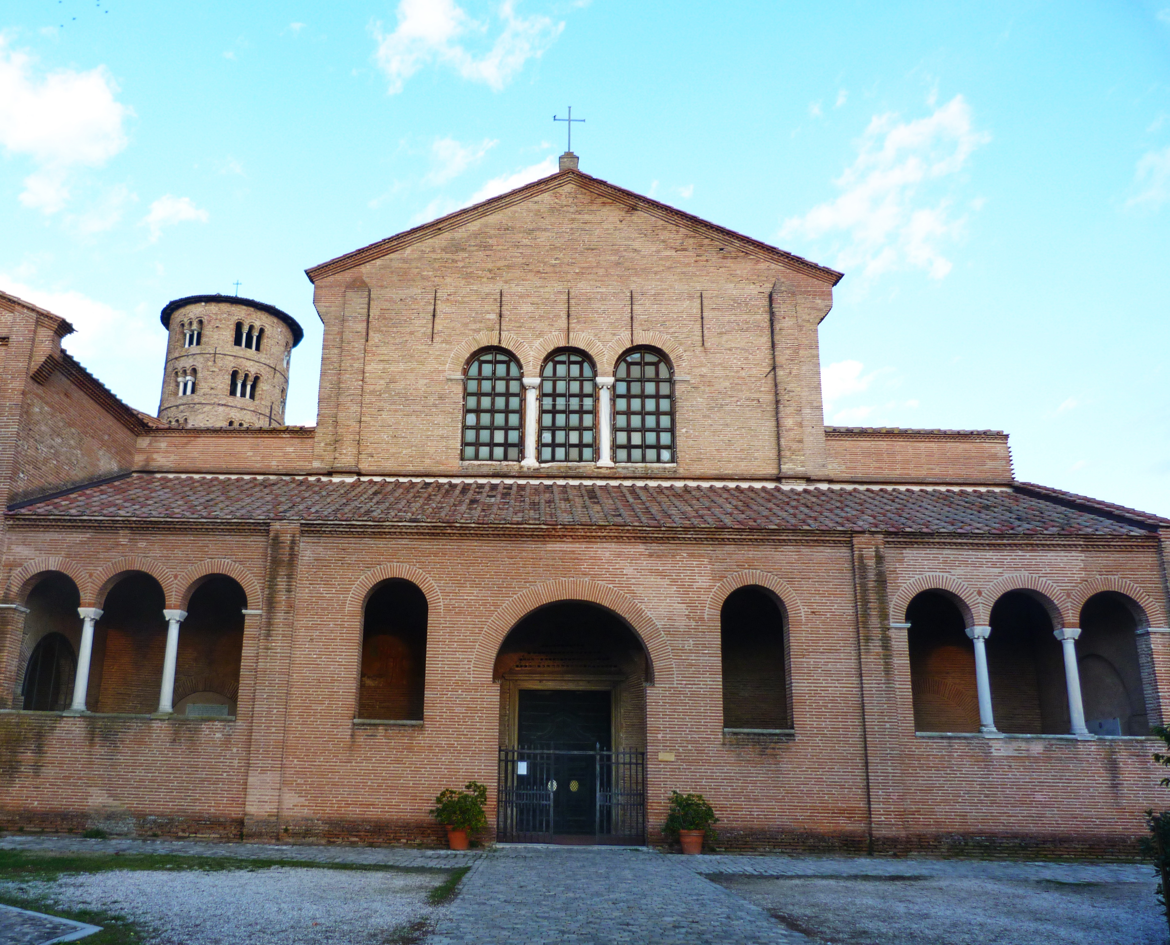 Basilica di Sant'Apollinare in Classe This is a photo of a monument which is part of cultural heritage of Italy.